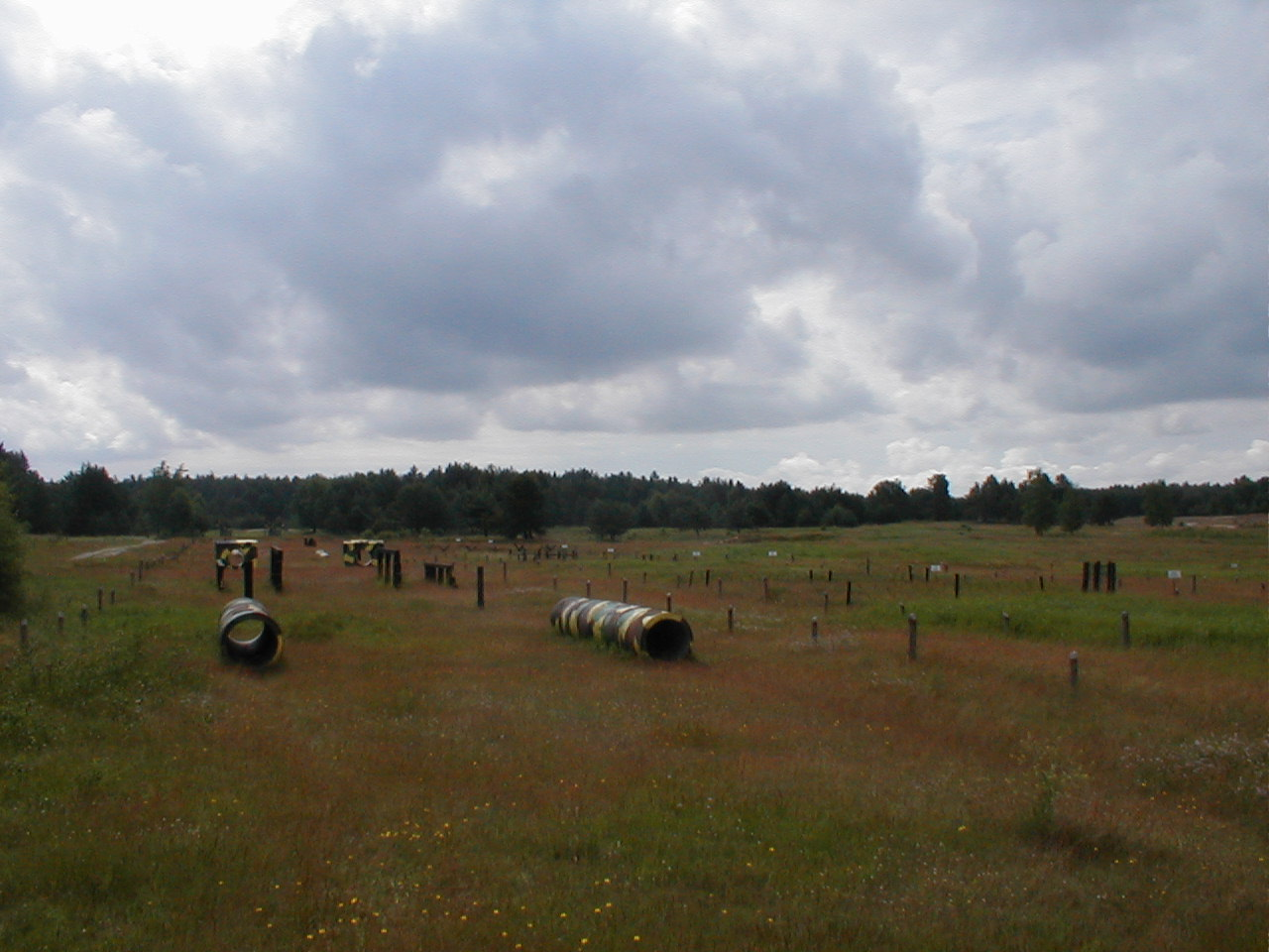 Tor taktyczny na poligonie Centrum Szkolenia Czołgowo-Samochodowego w Pile stan na 10.06.2002 r. przed likwidacją Centrum